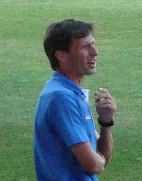 Ziganda-XerezCD-p1040374.jpg